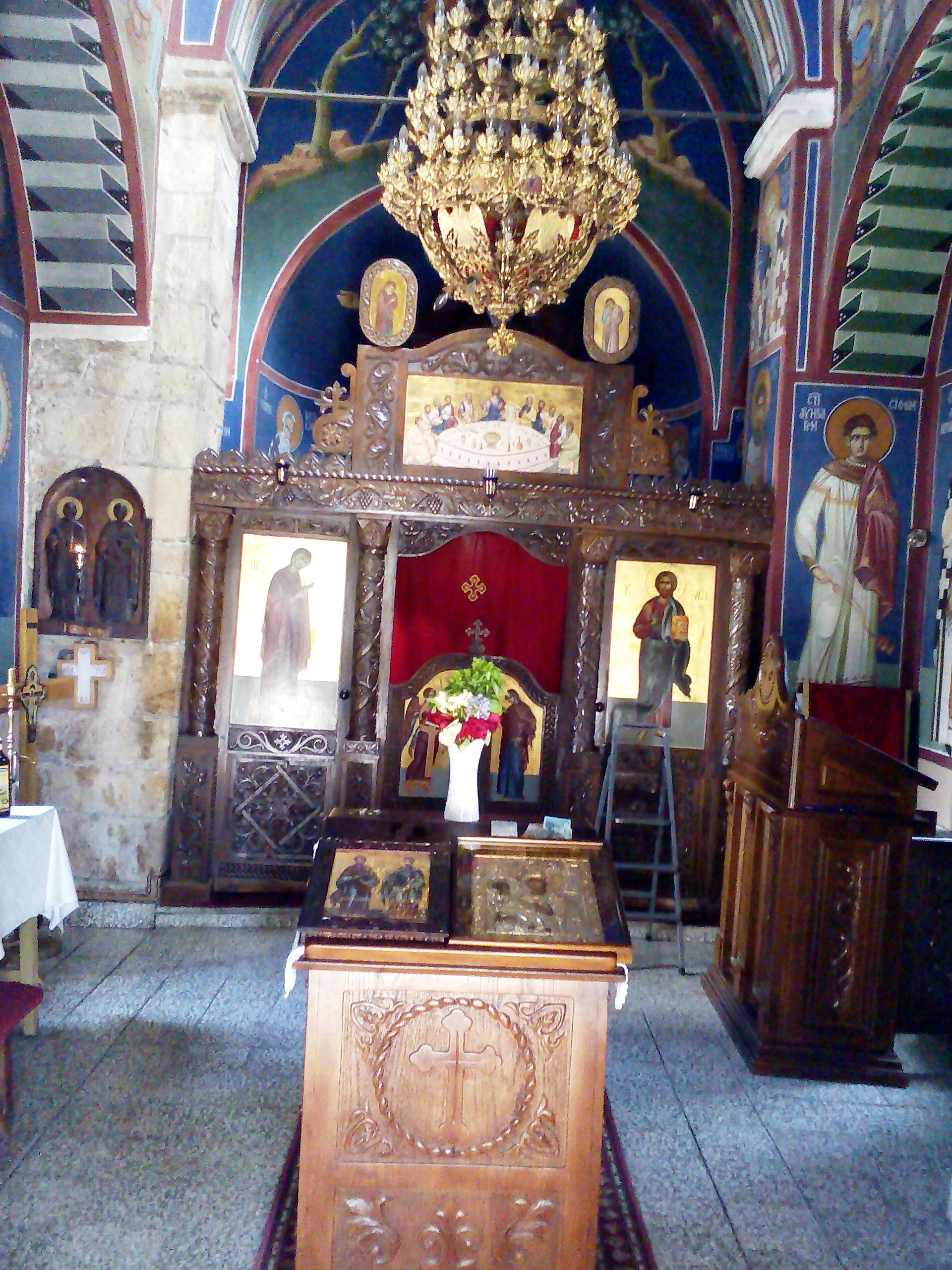 Манастир који се налази поред Велике Мораве, недалеко од села Гложане код Свилајнца